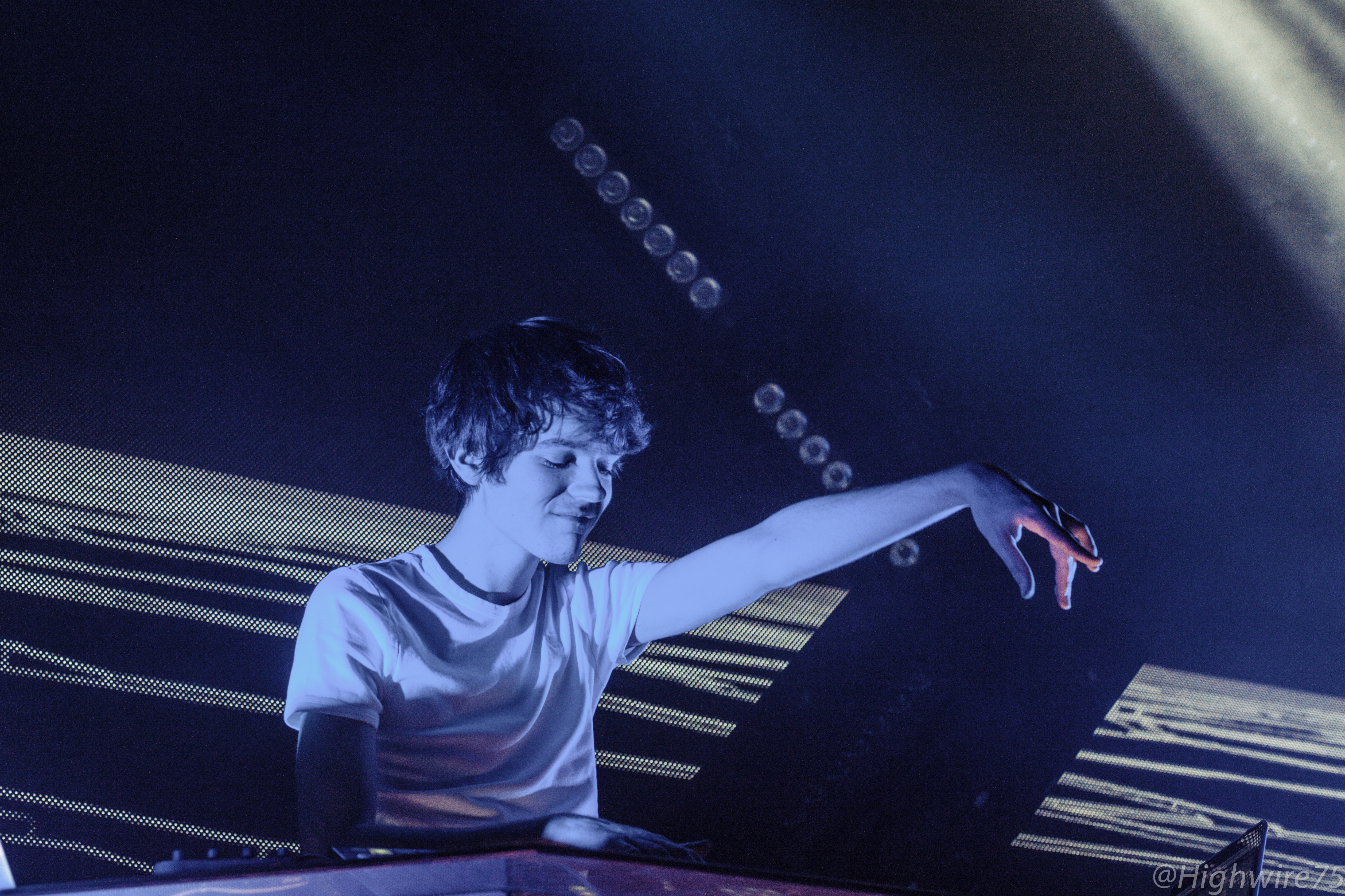 Madeon, Brussels Live, 04 april 2015